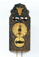 Eine Holzrädderuhr. Die älteste bekannte Bauform der Schwarzwälder Uhr. Hölzerne Radwellen laufen in hölzernen Trägerplatten (Platinen). Mit Waagbalken als Gangregler. Antrieb vermutlich ein glatter Feldstein an einer Schnur mit Gegengewicht. Die Laufdauer beträgt ca. 12 Stunden. Erst ab der Hälfte des 18. Jahrhunderts werden die hölzernen Zahnräder durch Messingräder ersetzt. Das Holzgestell mit hölzernen Trägerplatten bleibt erhalten.